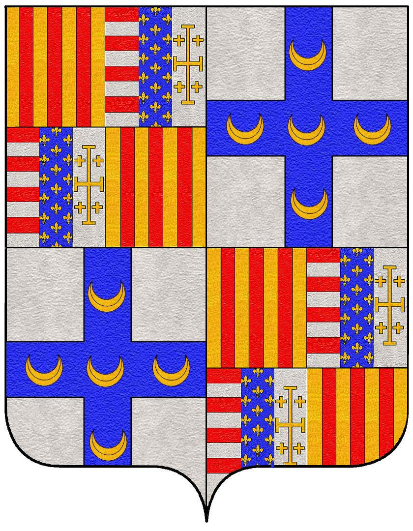 'Stemma Piccolomini d'Aragona'